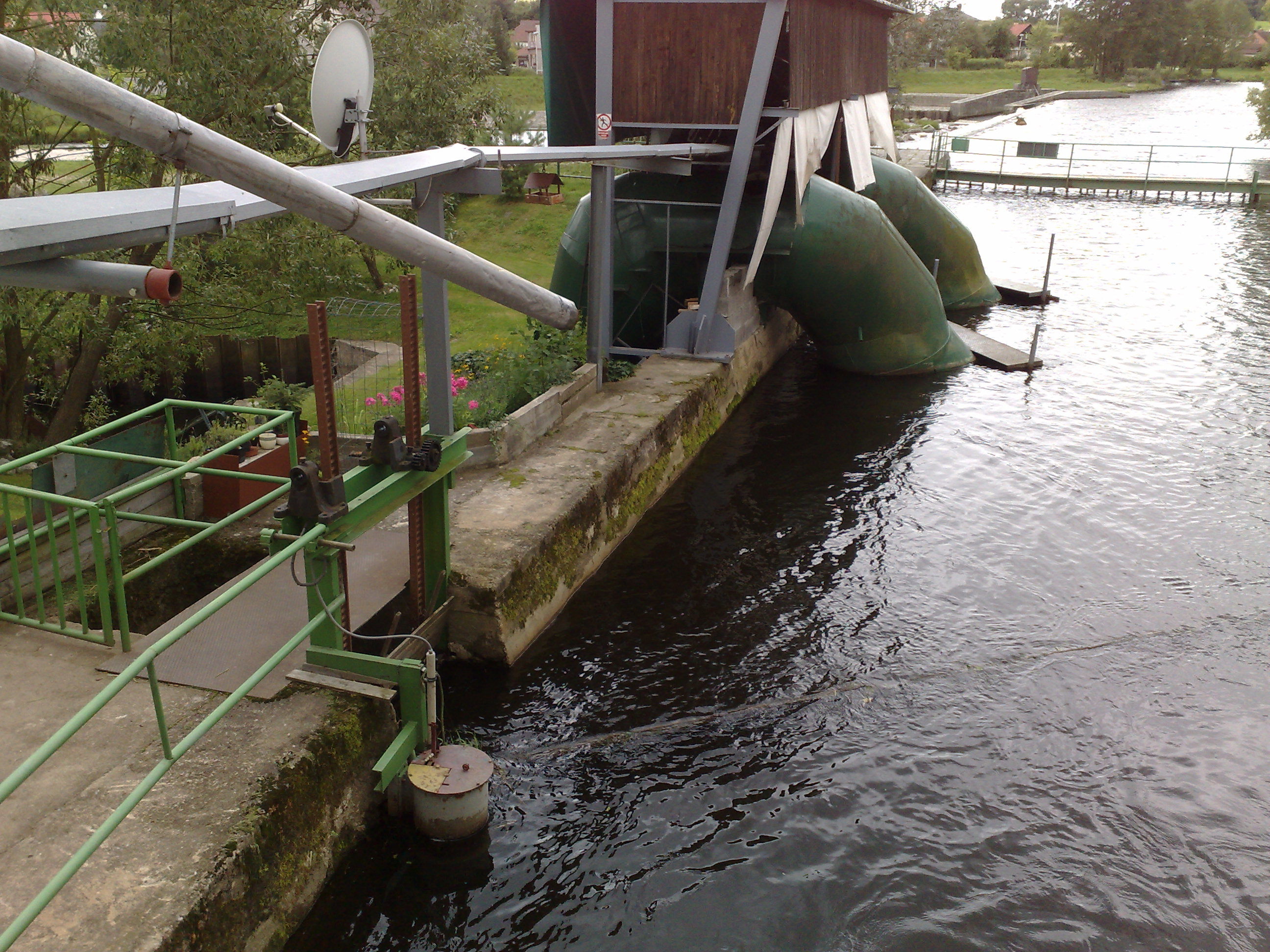 Přepadová turbína.